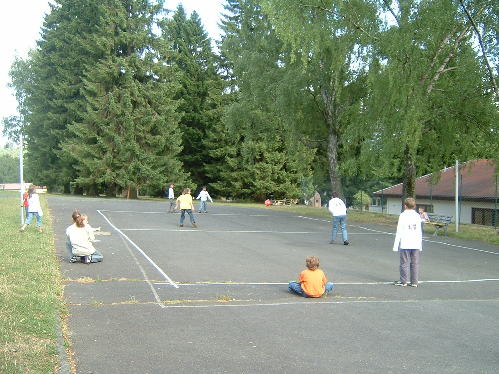 Völkerballspiel von Kindern auf einem eingezeichneten Feld im Schullandheim Wegscheide